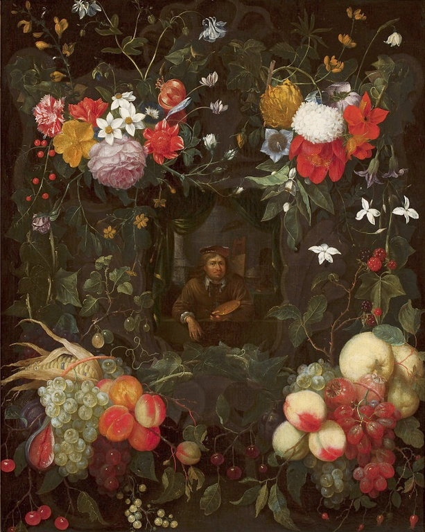 Self-portrait?